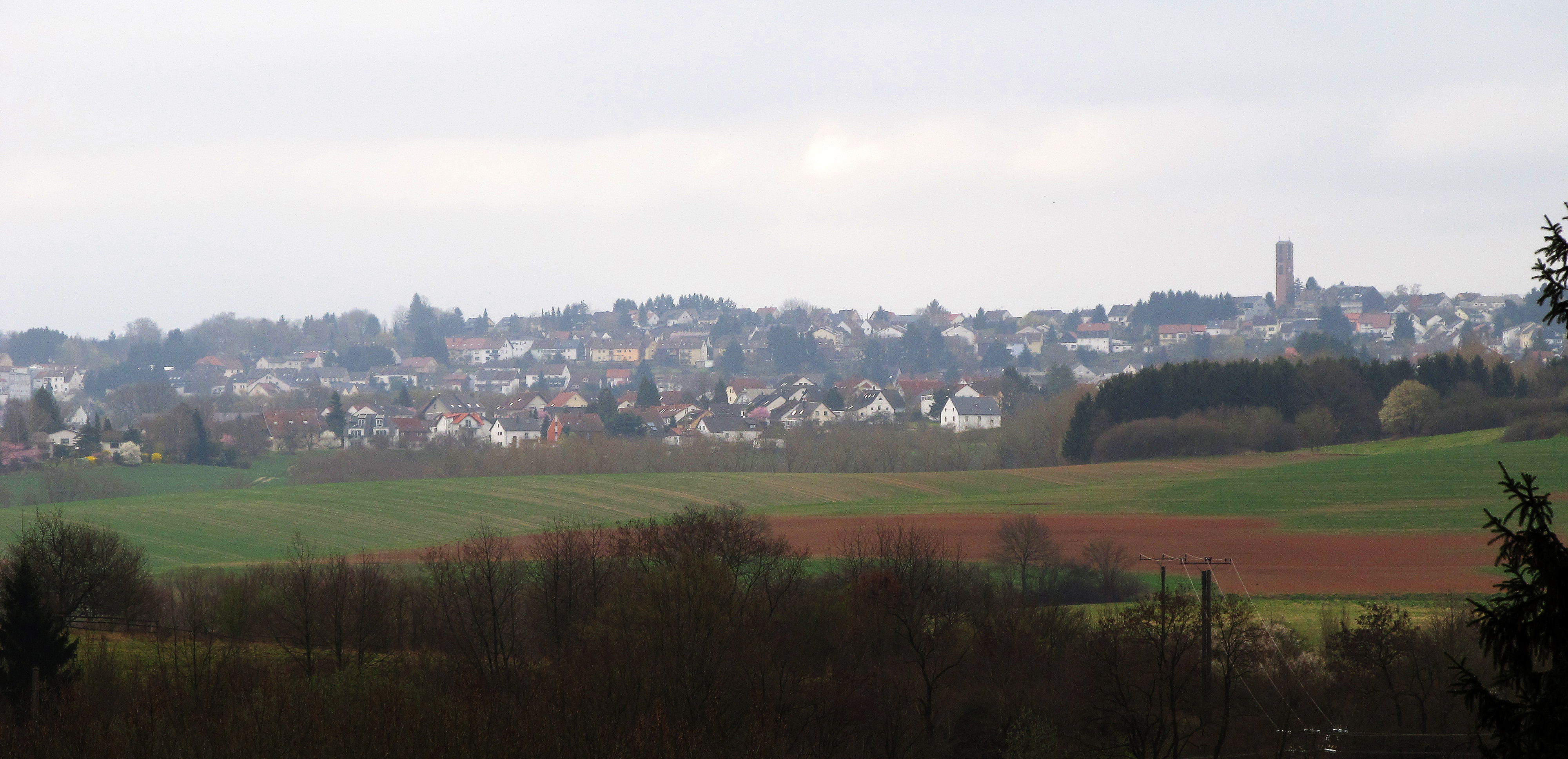 Ansicht von Riegelsberg, Regionalverband Saarbrücken, Saarland